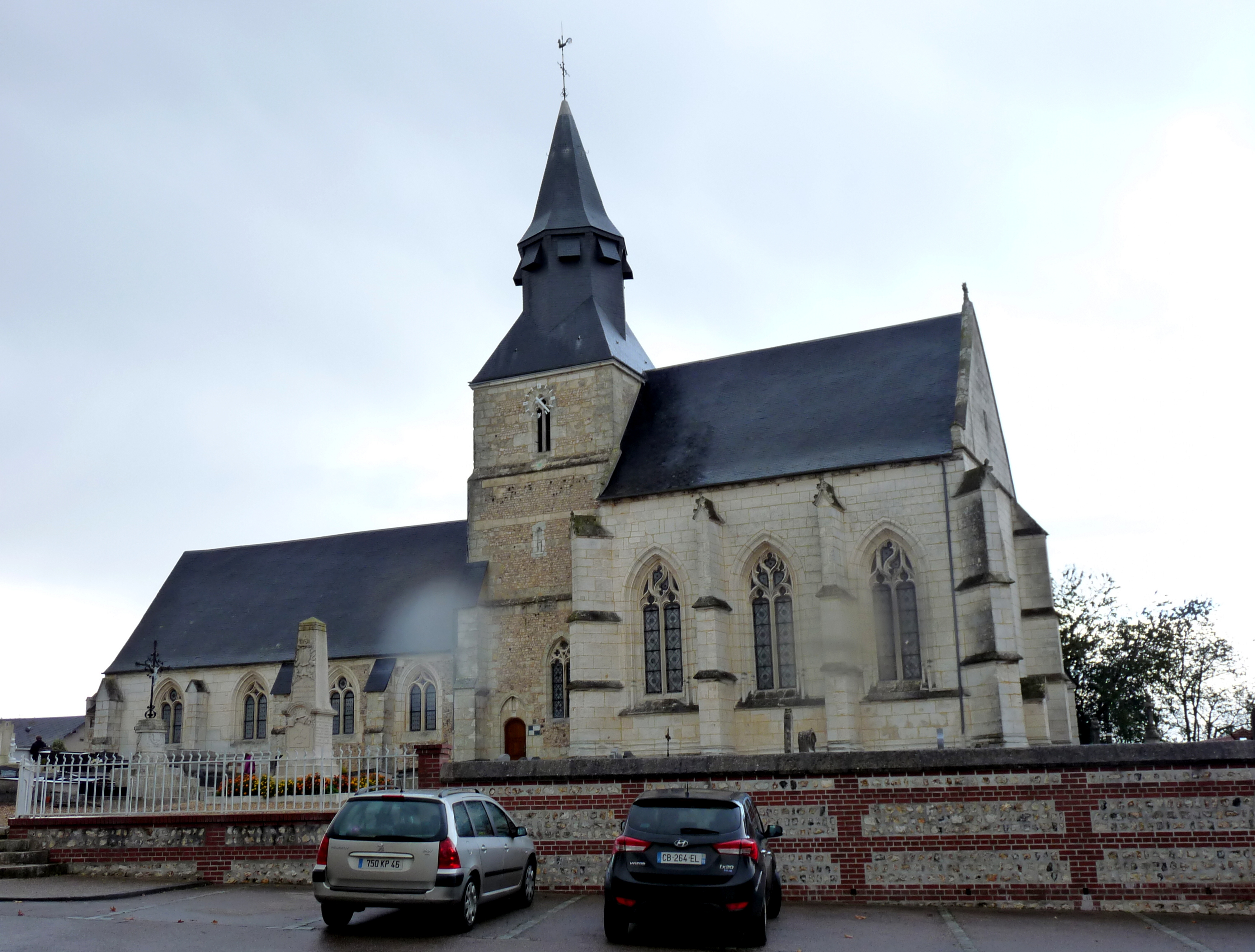 Église Notre-Dame-de-la-Nativité de Raffetot .